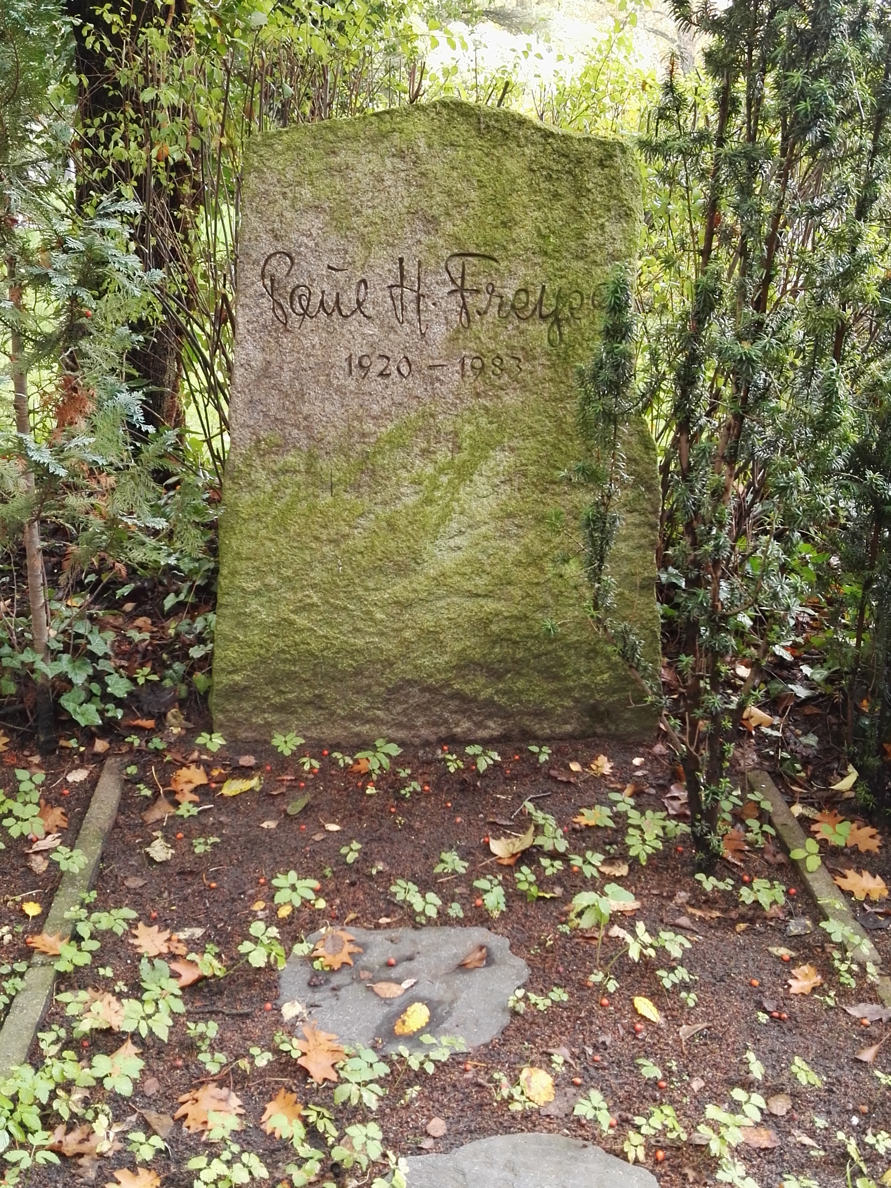 Grab von Paul Herbert Freyer auf dem Zentralfriedhof Friedrichsfelde